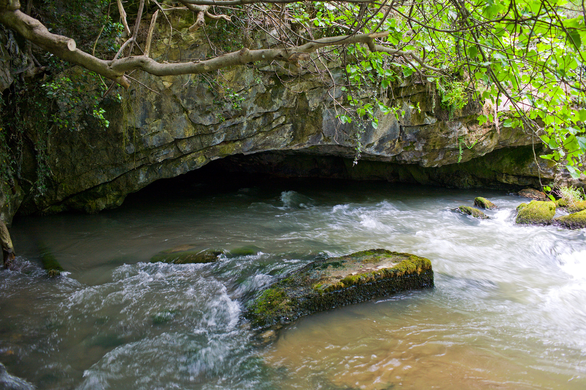 Пещерата Маарата - извора на река Панега до село Калапот, Гърция